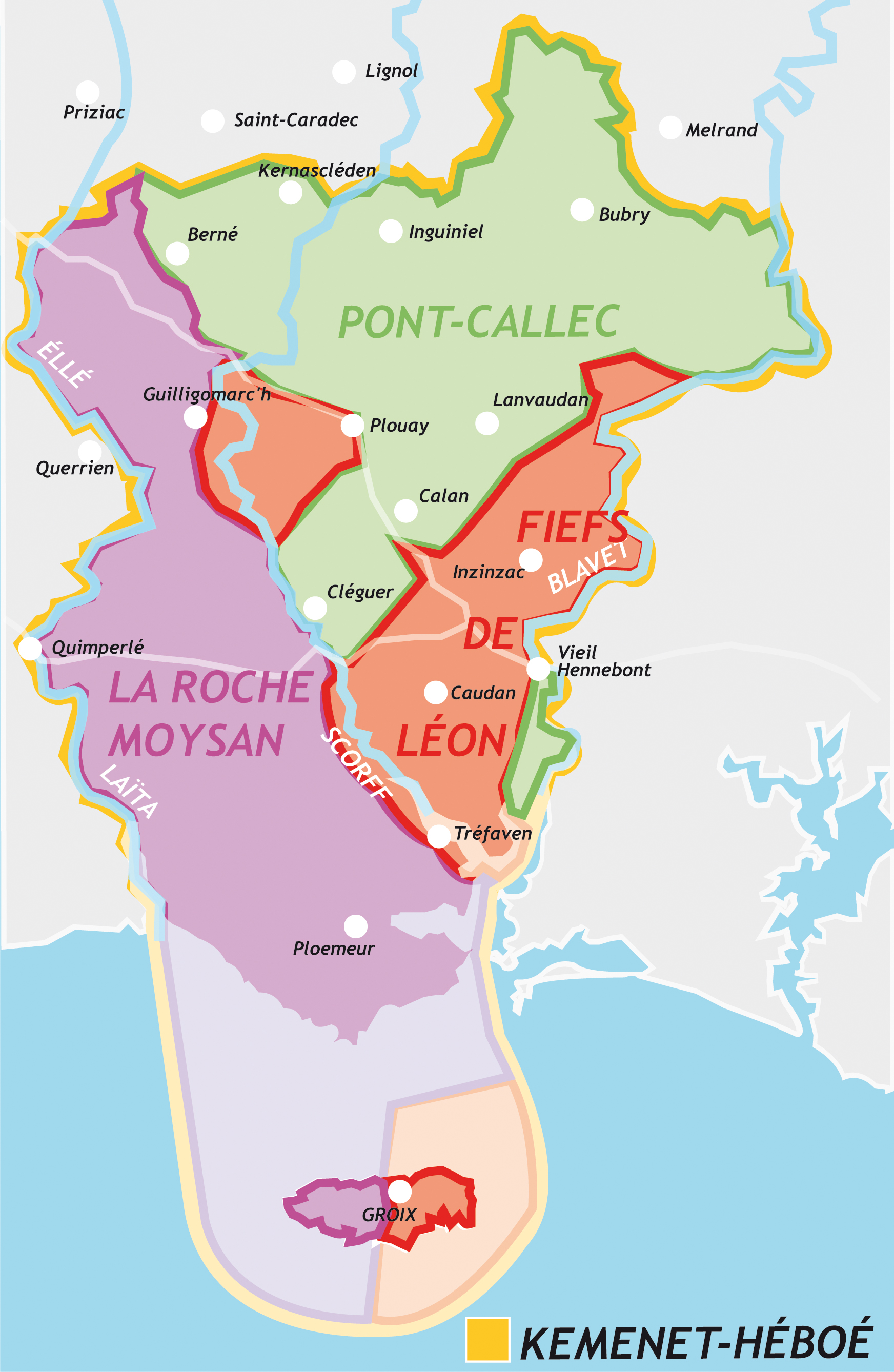 Les frontières du Kemenet-Héboé et celles de son démantellement du XIe siècle à la fin de l'Ancien Régime